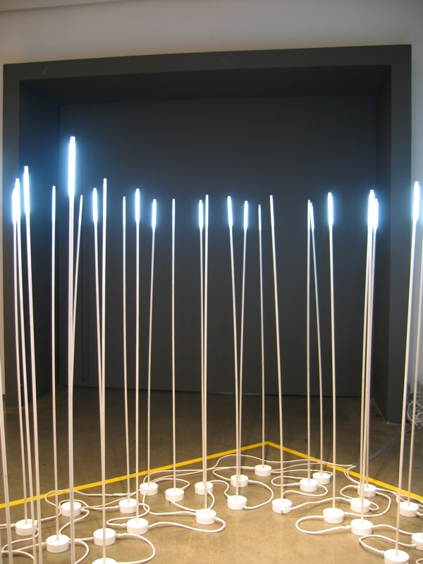 Exhibida en la Milk Gallery, New York.